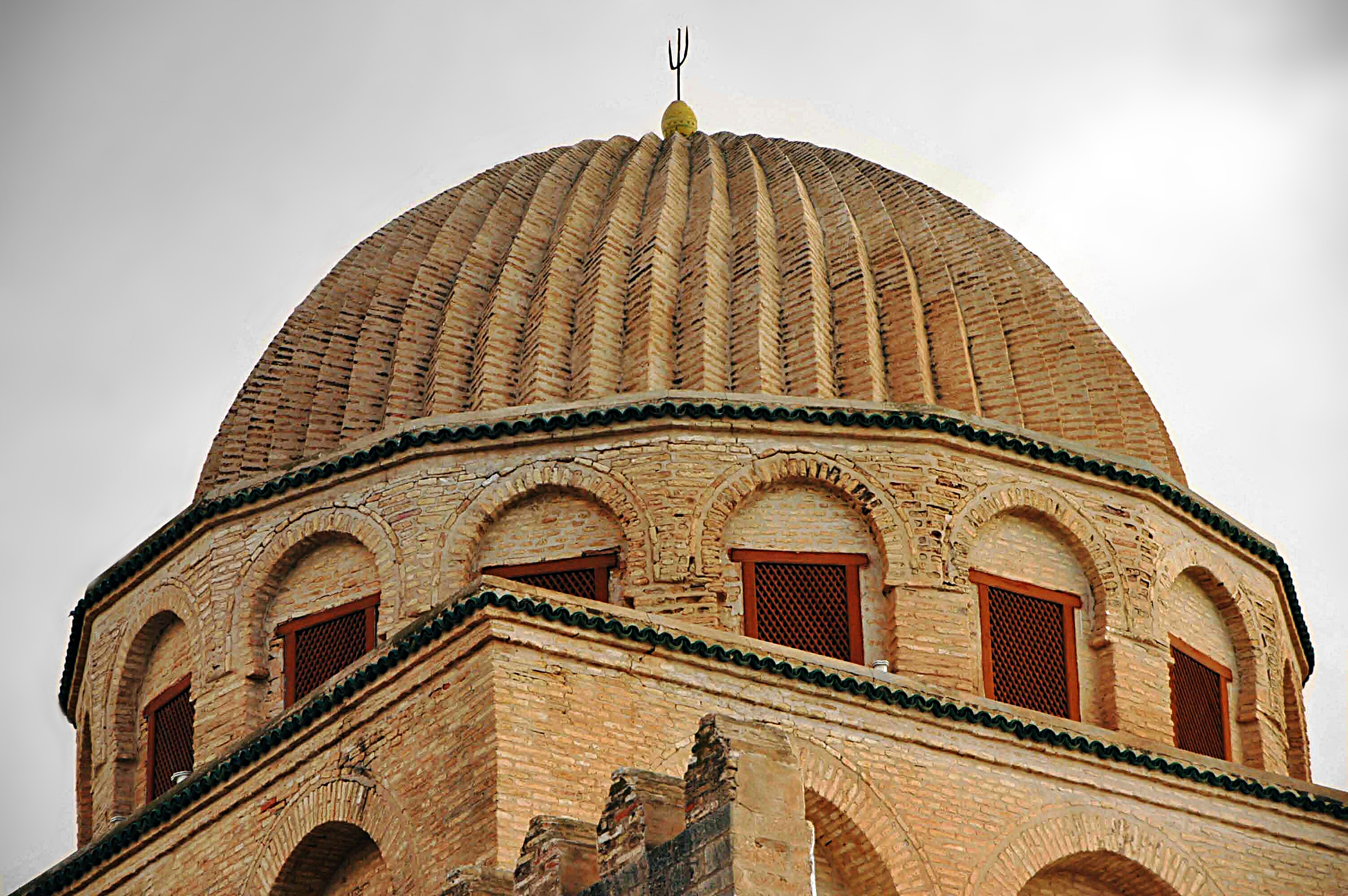 Coupole côtelée à tambour dodécagonal dans la Grande Mosquée de Kairouan, en Tunisie.